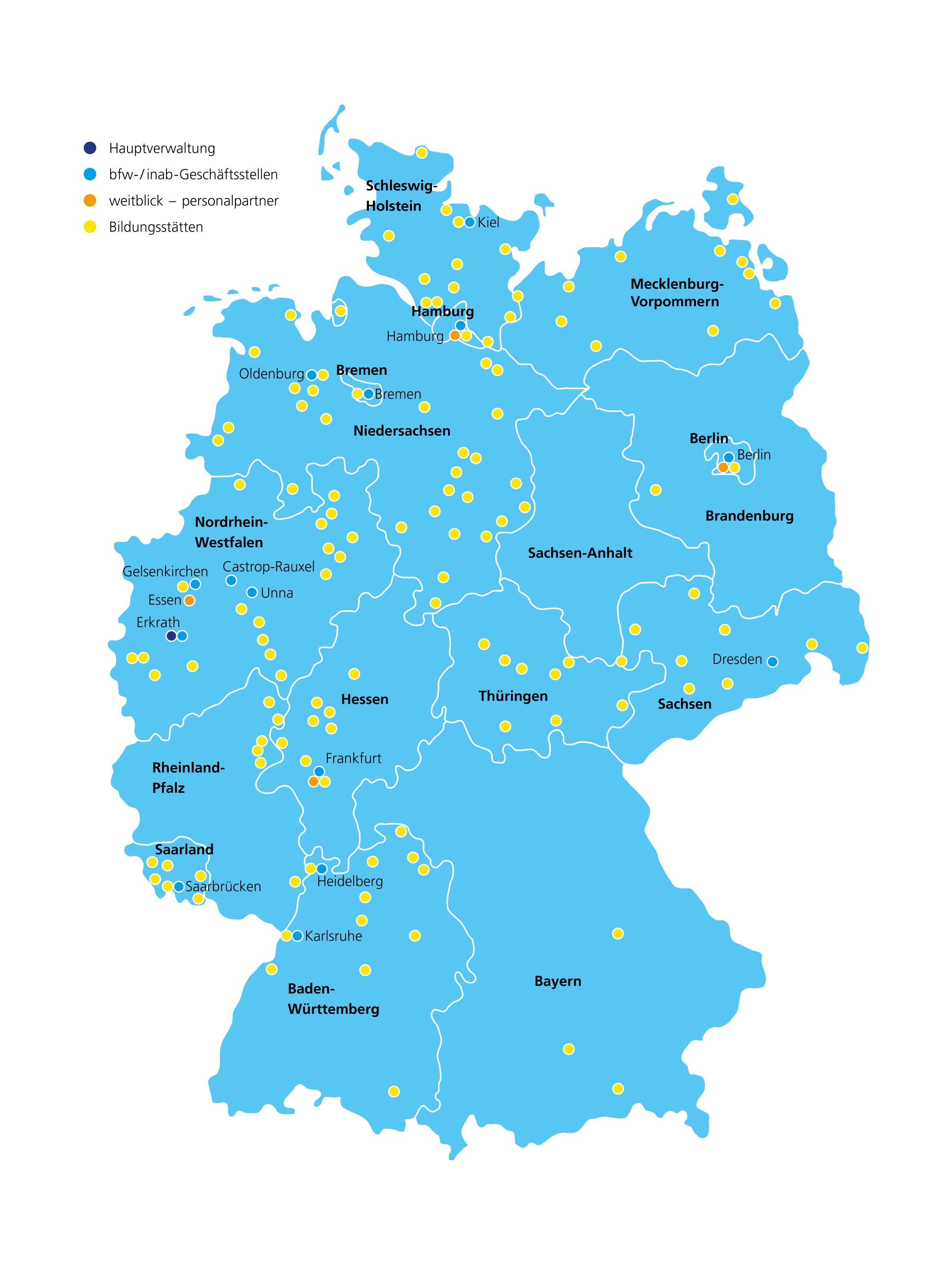 Zeigt die Standorte des BFW